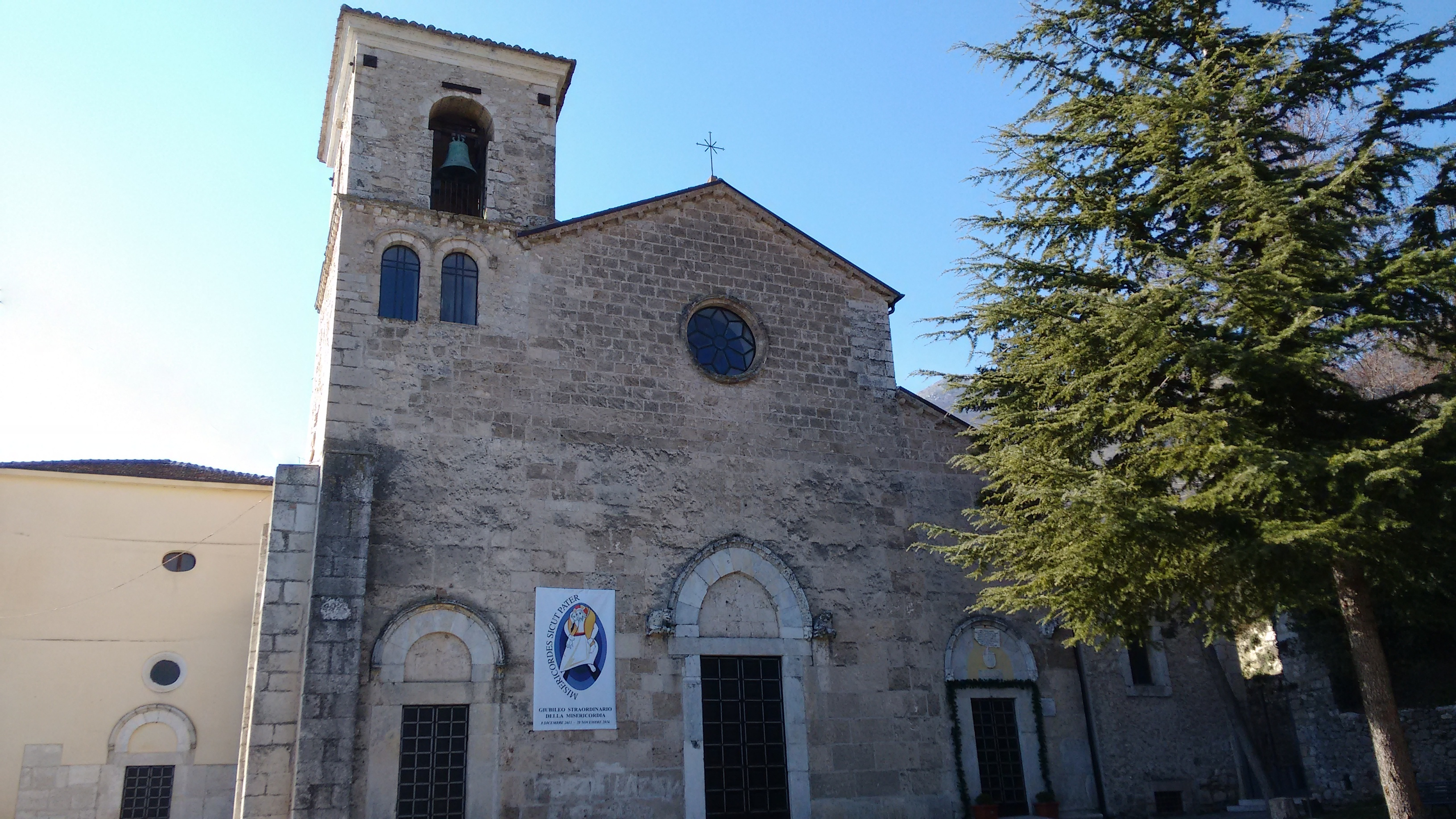 Esterno della Concattedrale con la Porta Santa